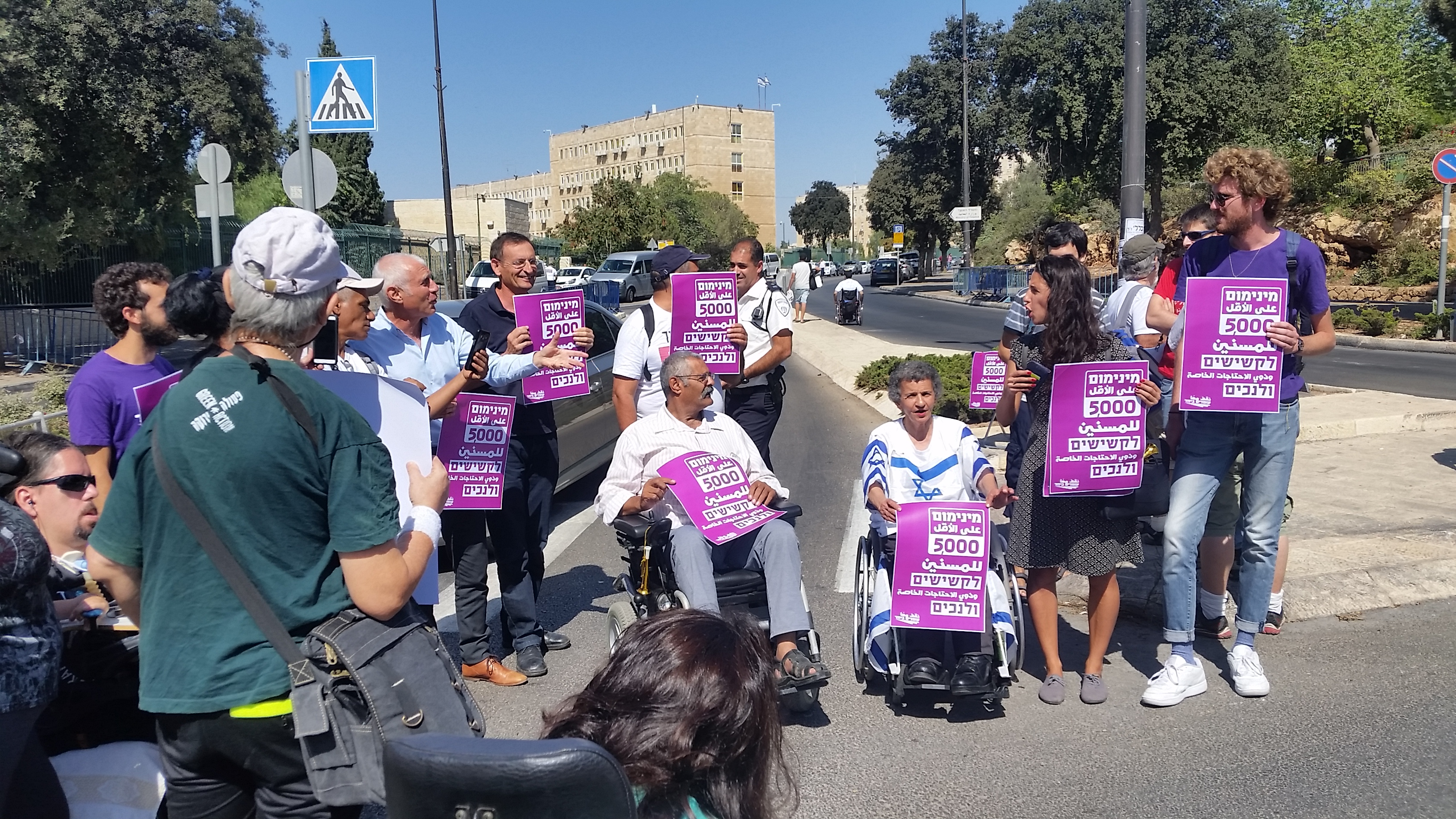 הפגנה בסמוך למשכן הכנסת ביום פתיחת מושב החורף 2017 בתמונה נמצא גם חבר הכנסת דב חנין